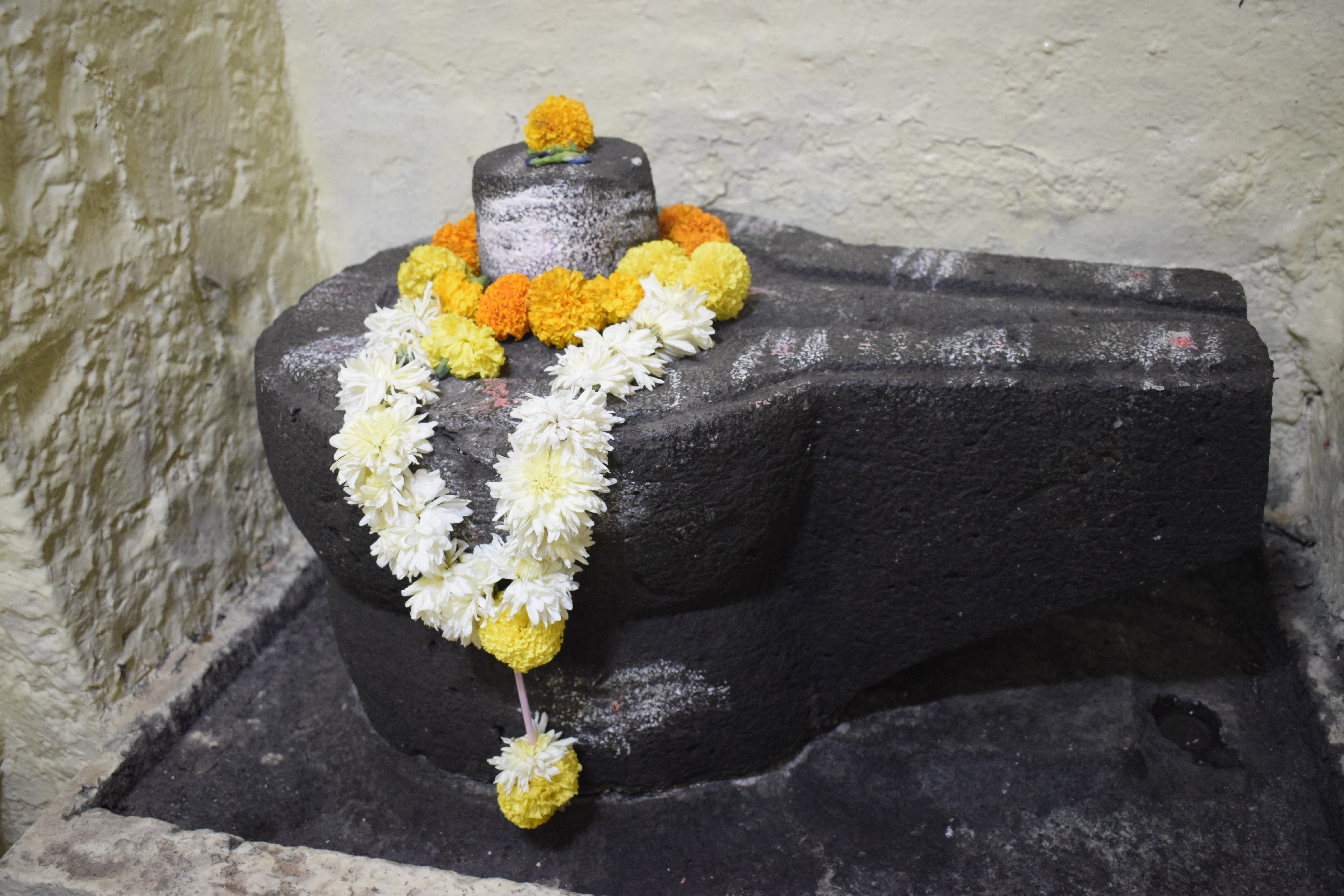 श्री मोळगेश्वर लिंग